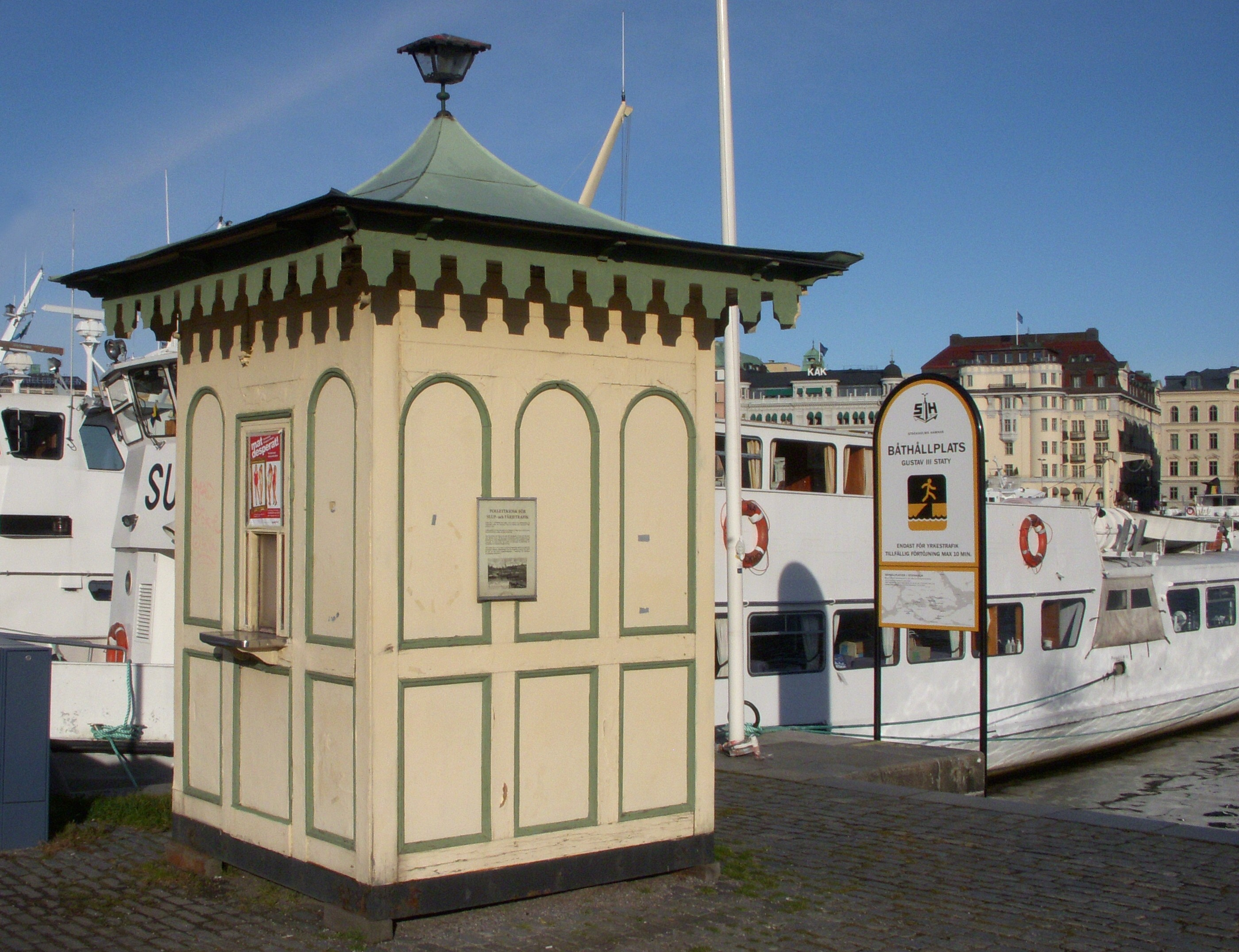 Pollettkiost på Skeppsbron i Stockholm